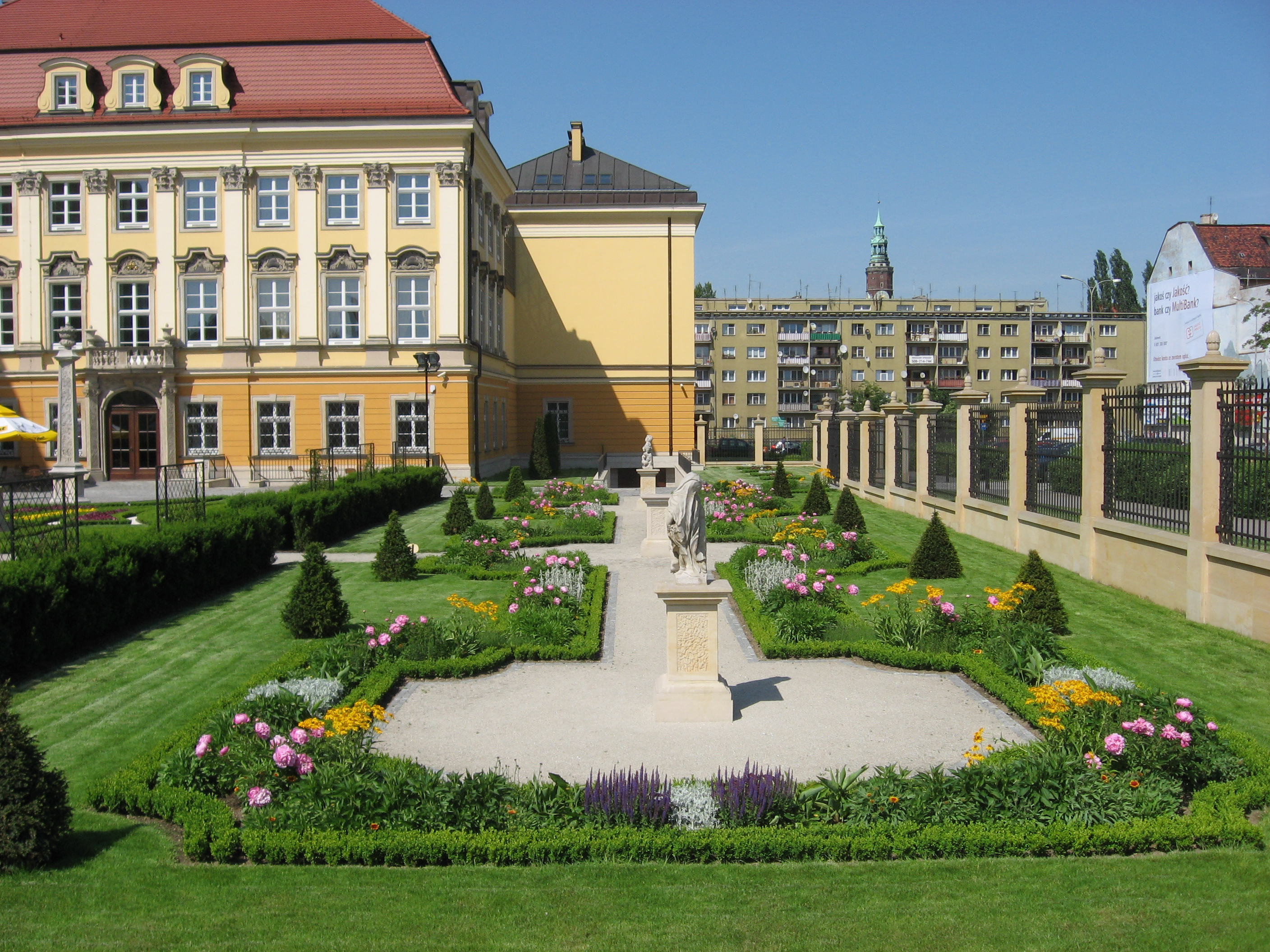 Ogród Barokowy przy Muzeum Miejskim Wrocławia